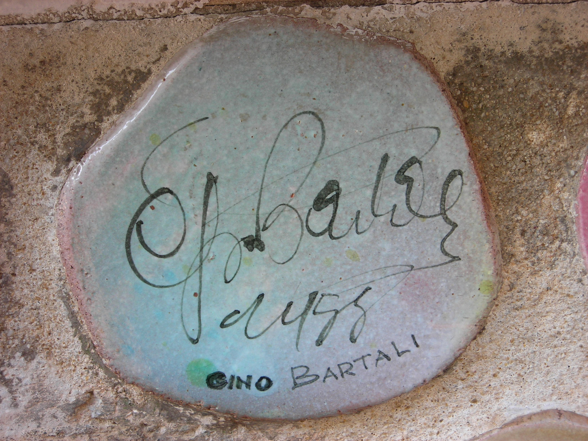 Piastrella del Muretto di Alassio autografata da Gino Bartali